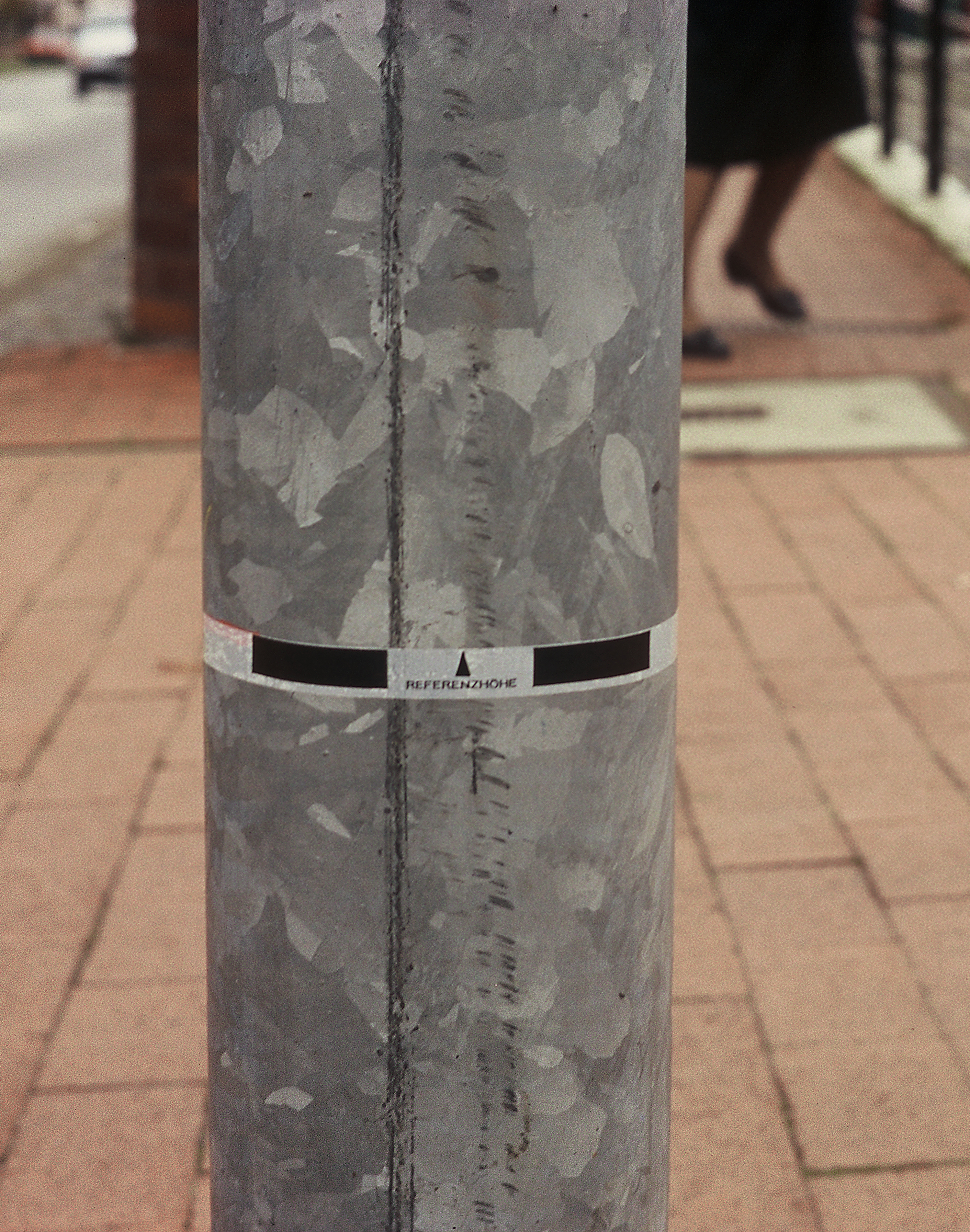 Beitrag von Christian Hasucha für "vor Ort", Langenhagen, 1993. Die Höhe eines Stehtisches über Normalnull wurde auf sämtliche Straßenmasten der Stadt mittels Klebeband übertragen (REFERENZHÖHE). Sie zeigte sich in manchen Gegenden über Kopfhöhe, in anderen in Bodennähe. Ein Projekt aus Hasuchas Stadtkunst - Reihe "Öffentliche Interventionen" (Kunst im öffentlichen Raum), gefördert von der Stadt Langenhagen. Nach Bekanntwerden wurde der Kulturetat der Stadt vorübergehend gekürzt, nachfolgende Proteste wegen unzulässiger "Zensur" waren erfolgreich: Der Etat wurde wieder aufgestockt.